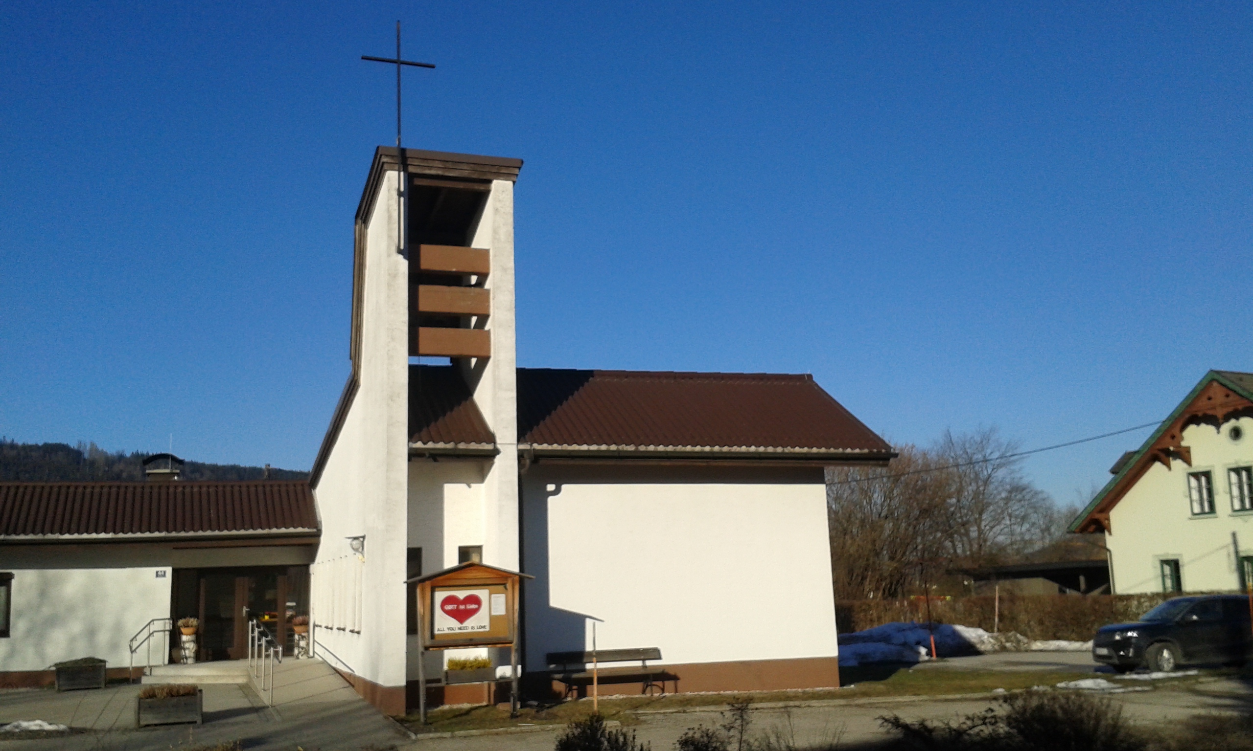 Die 1965 erbaute Hl.-Geist-Kirche ist die Evangelische Kirche der Marktgemeinde Scharnstein im Bezirk Gmunden. Die Kirche gehört zur Evangelischen Superintendentur A.B. Oberösterreich.